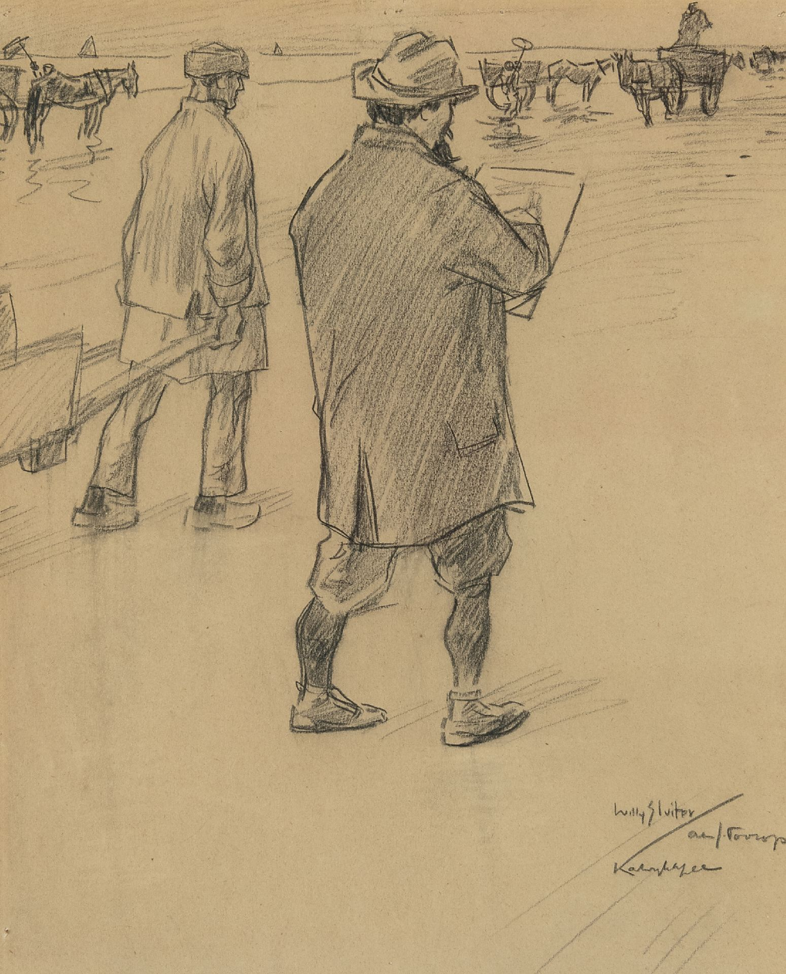 Jan Willem Sluiter Jan Toorop macht Skizzen auf dem Strand von Katwijk